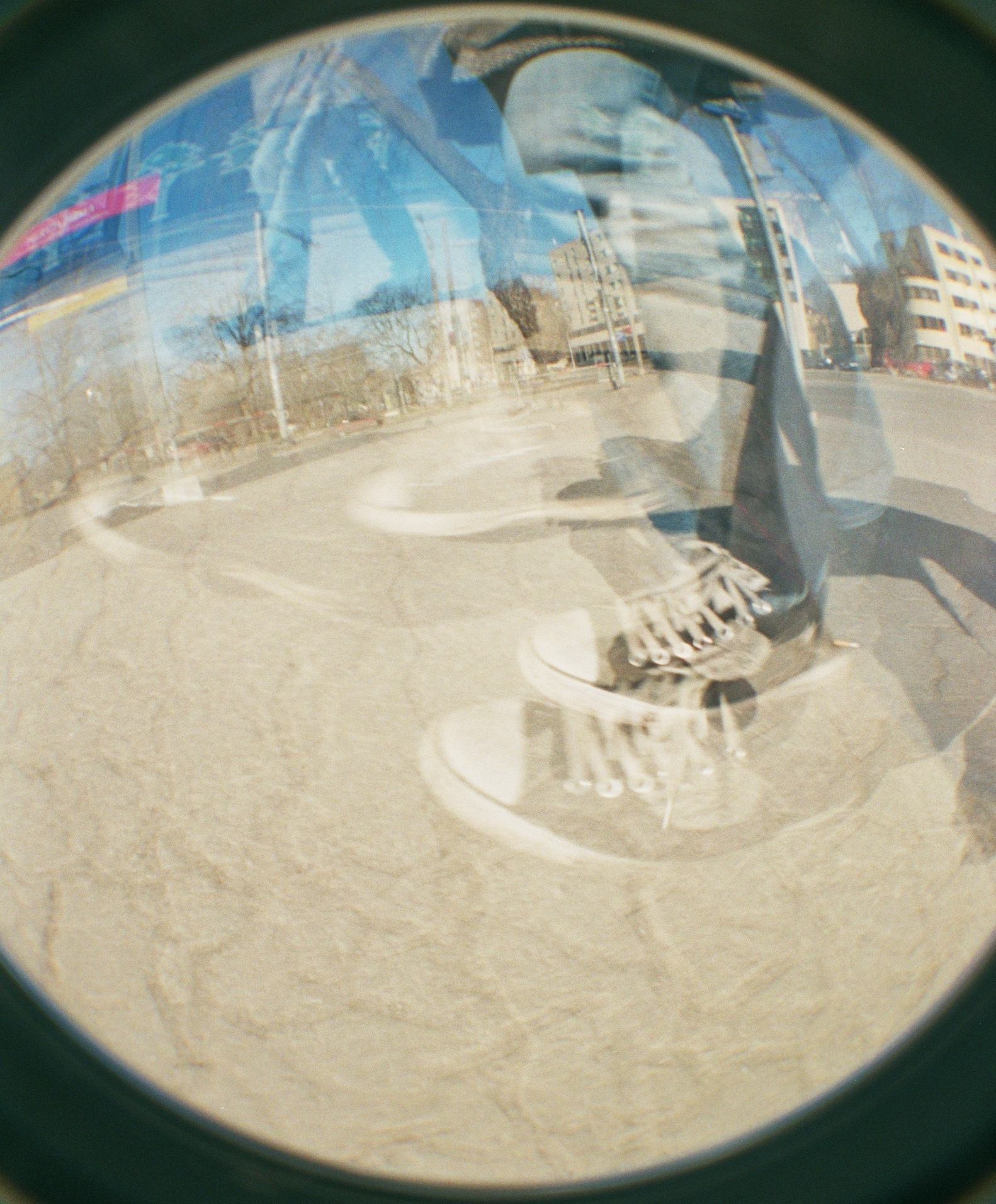 Kalasilm-objektiiviga jäädvustatud jalad